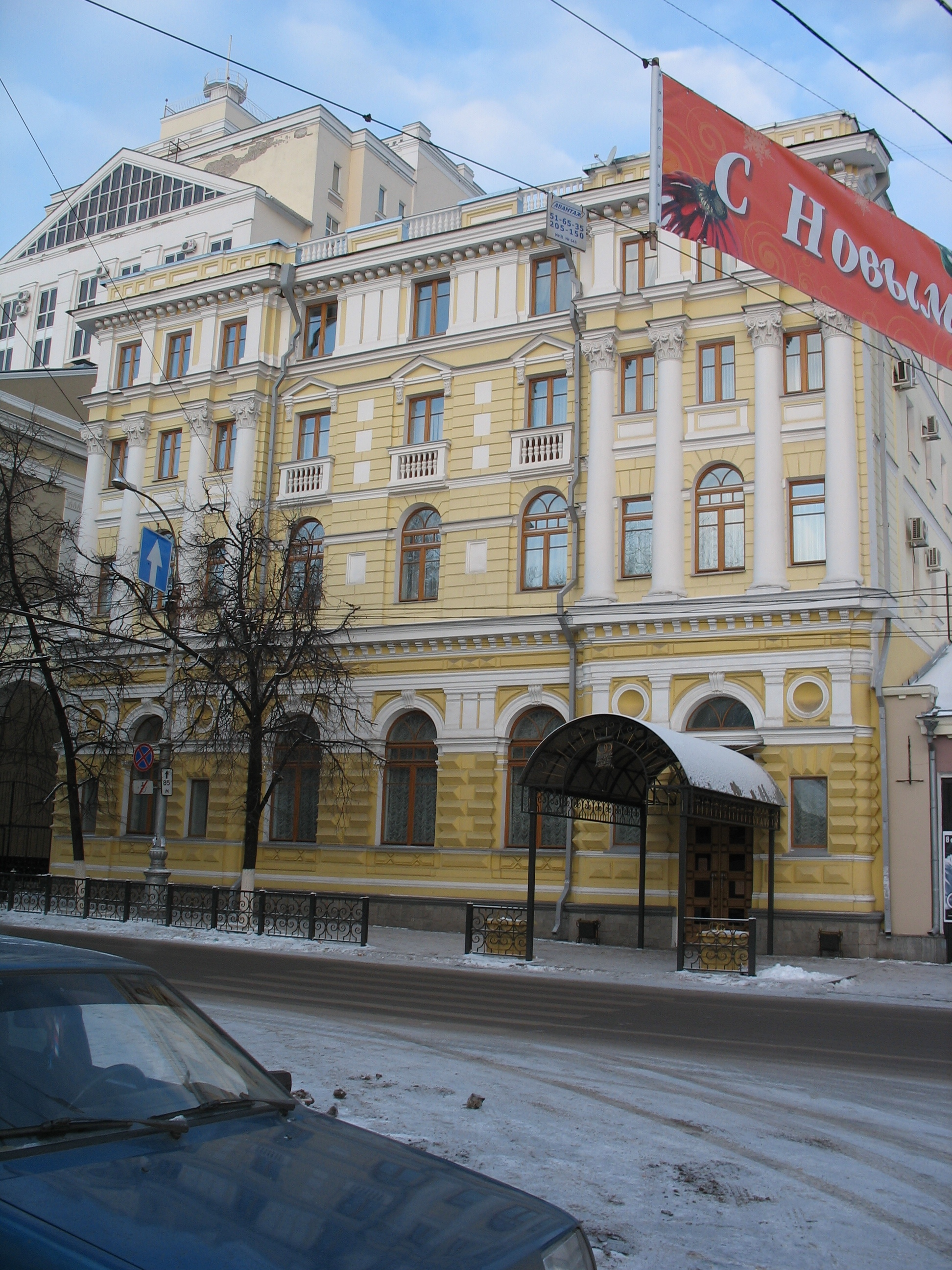 Дворец брагосочетаний Воронежа (бывш. коммерческий банк)